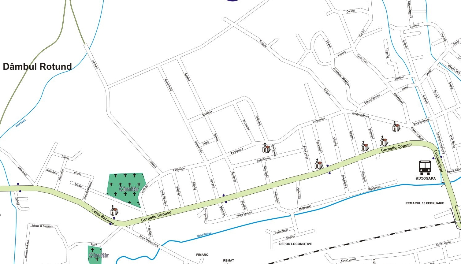 Harta cartierului clujean Dambul Rotund